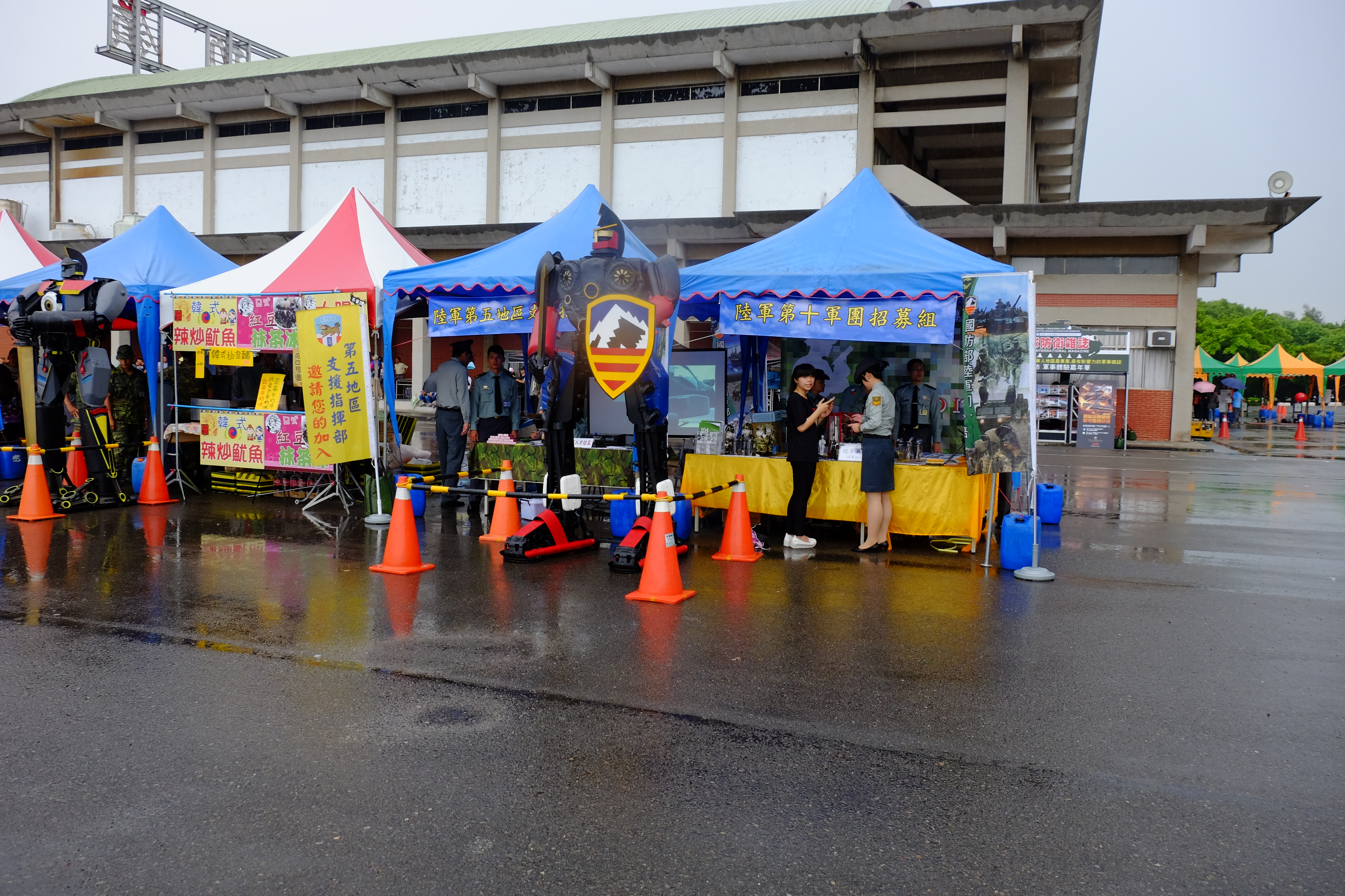 2015年成功嶺營區開放活動，介壽臺大校場南側的陸軍第十軍團指揮部與陸軍第五地區支援指揮部人才募集攤位。